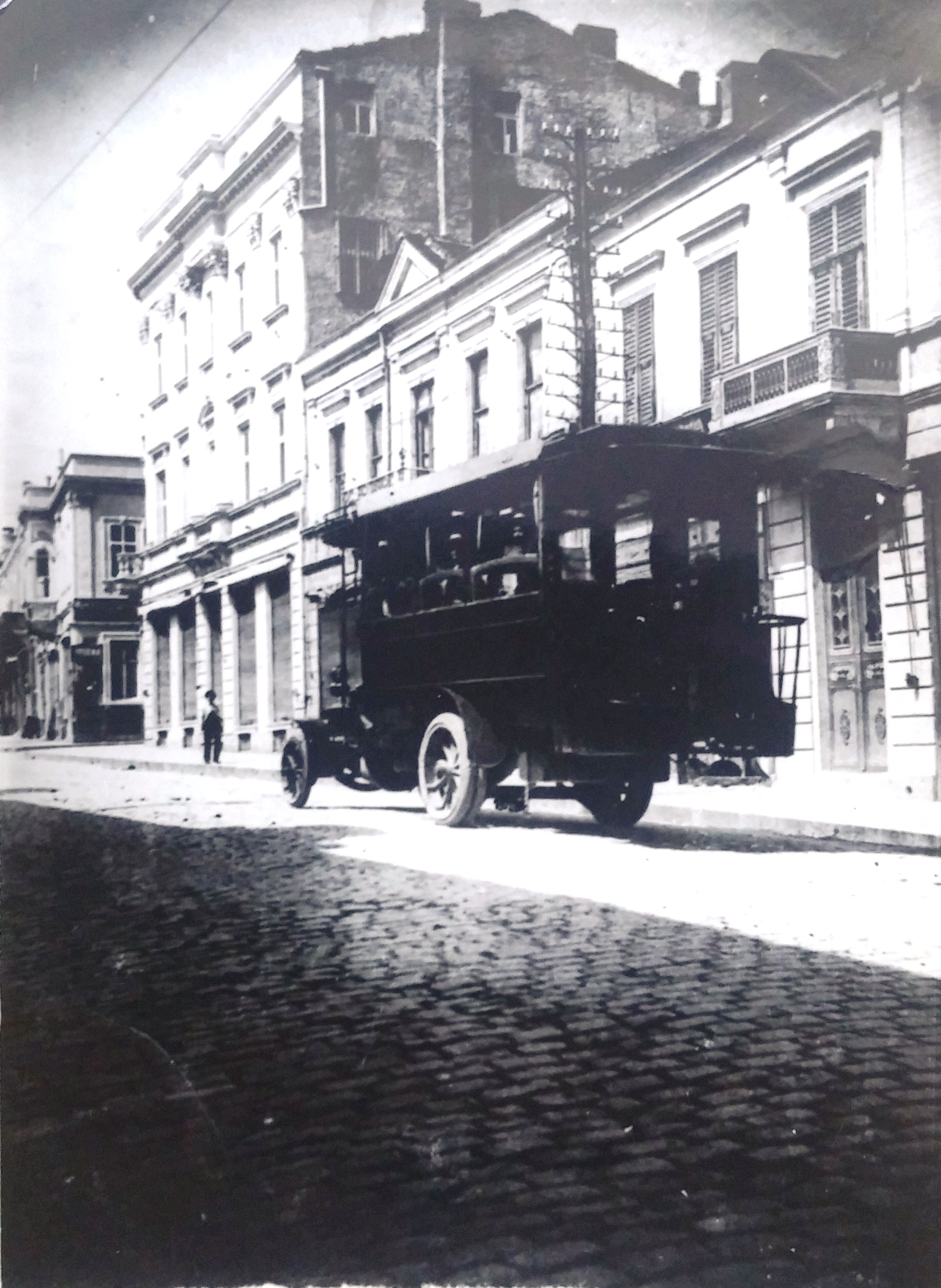 Снимка на първите коли, обслужващи градския транспорт по ул. „Преславска“.